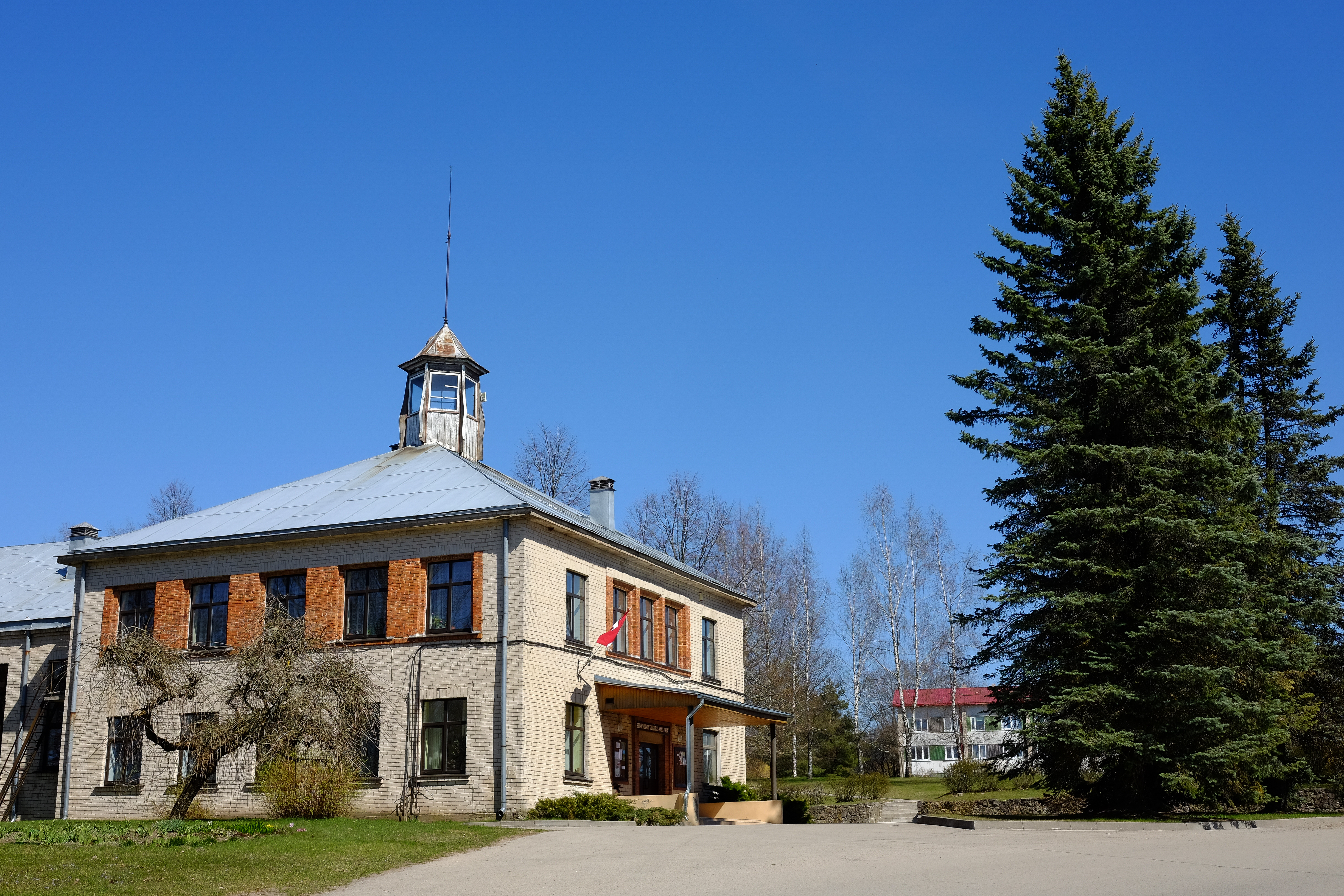 Loja, Sējas novada pašvaldības domes ēka